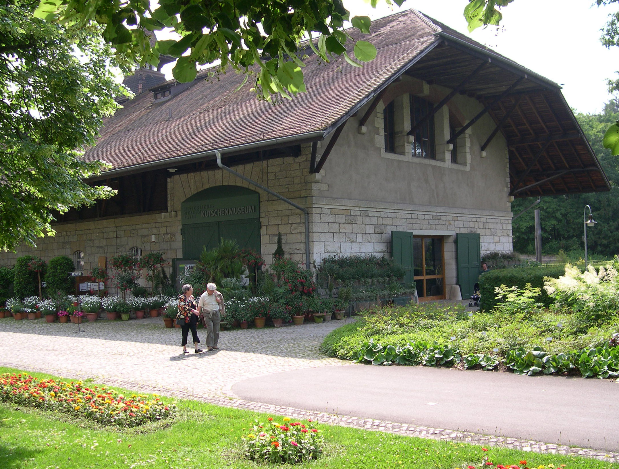 Kutschenmuseum in Brüglingen bei Basel.